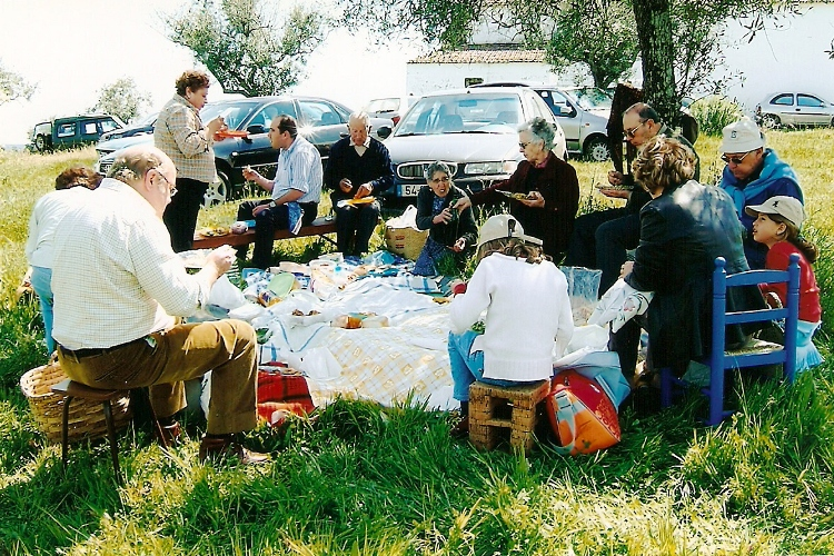 Romeiros merendando na romaria de N.S.da Granja.